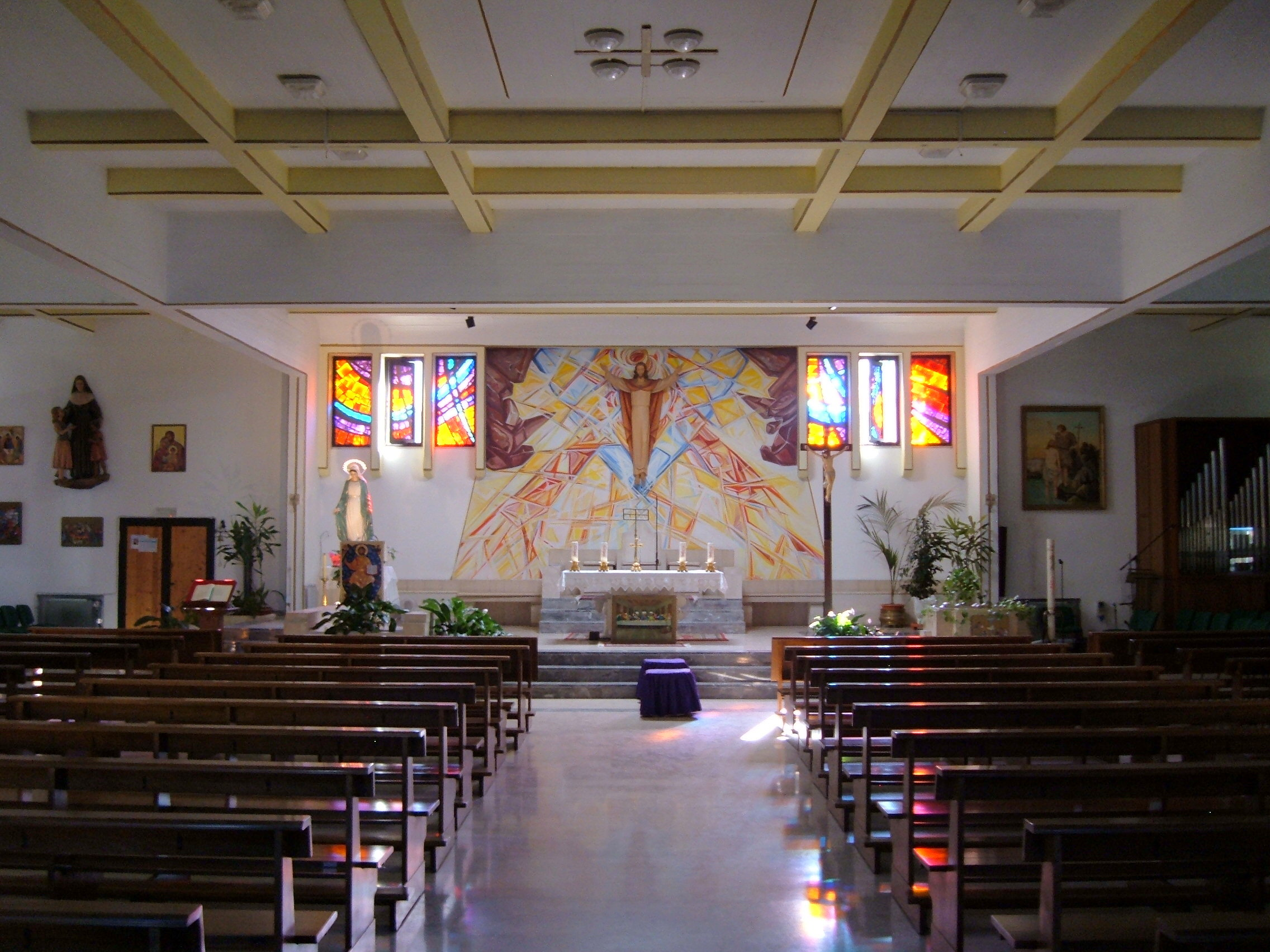 Chiesa di Santa Giulia Billiart, a Roma, nel quartiere Tuscolano. Interno.